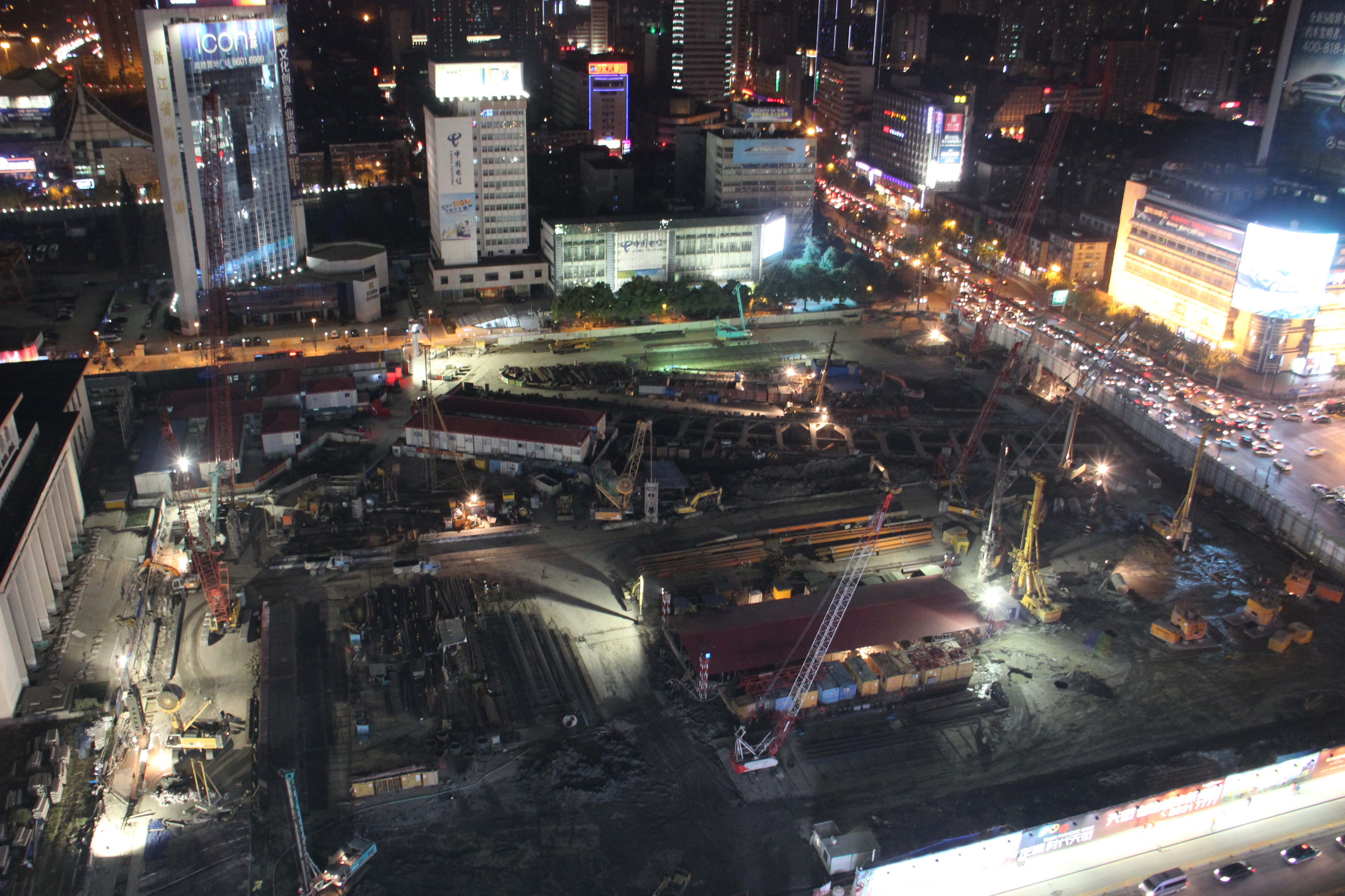 从杭州大厦顶部观看武林广场工地，2013年11月